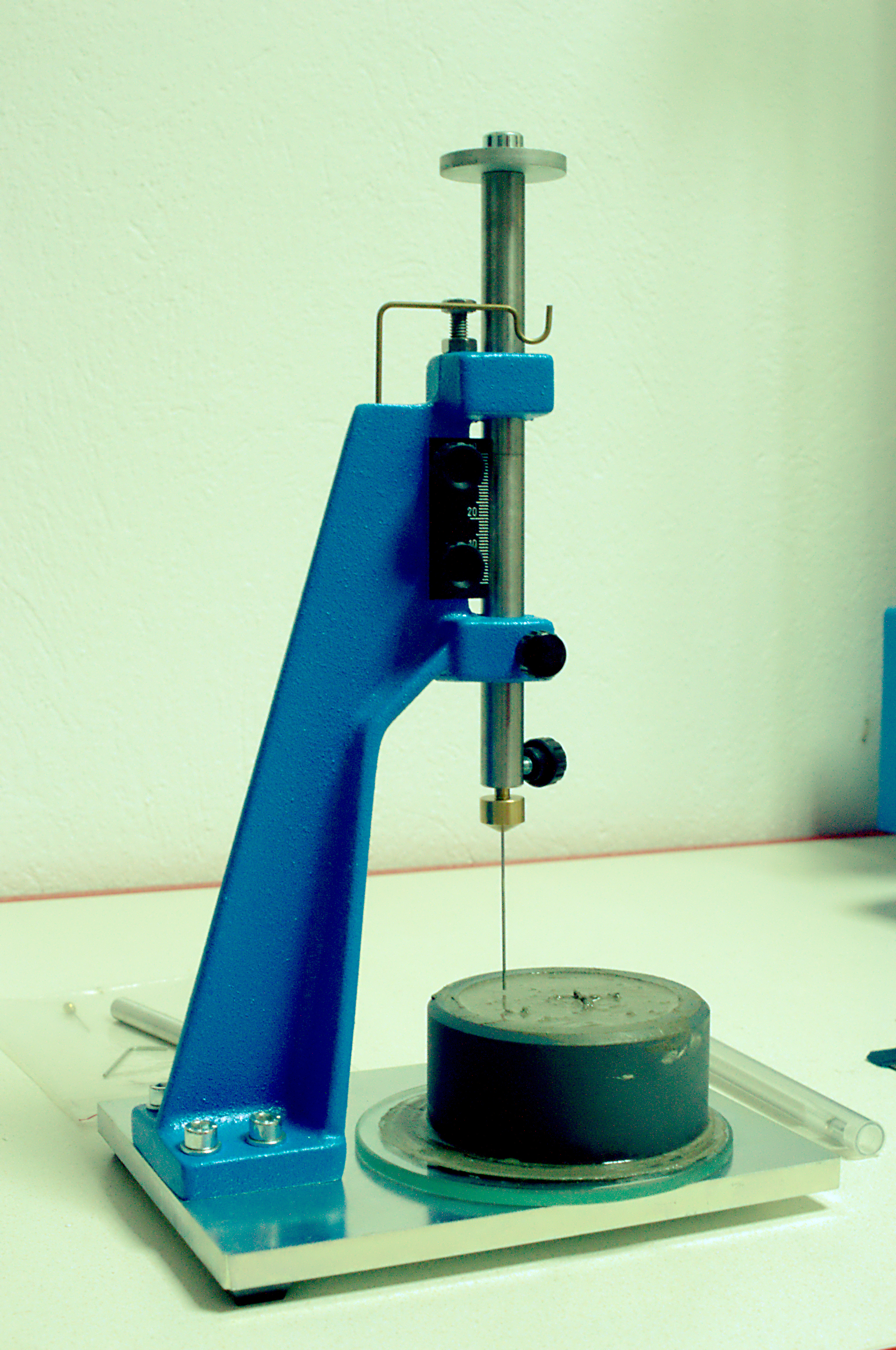 Appareil de Vicat pour mesurer le temps de prise d'une pâte de ciment.